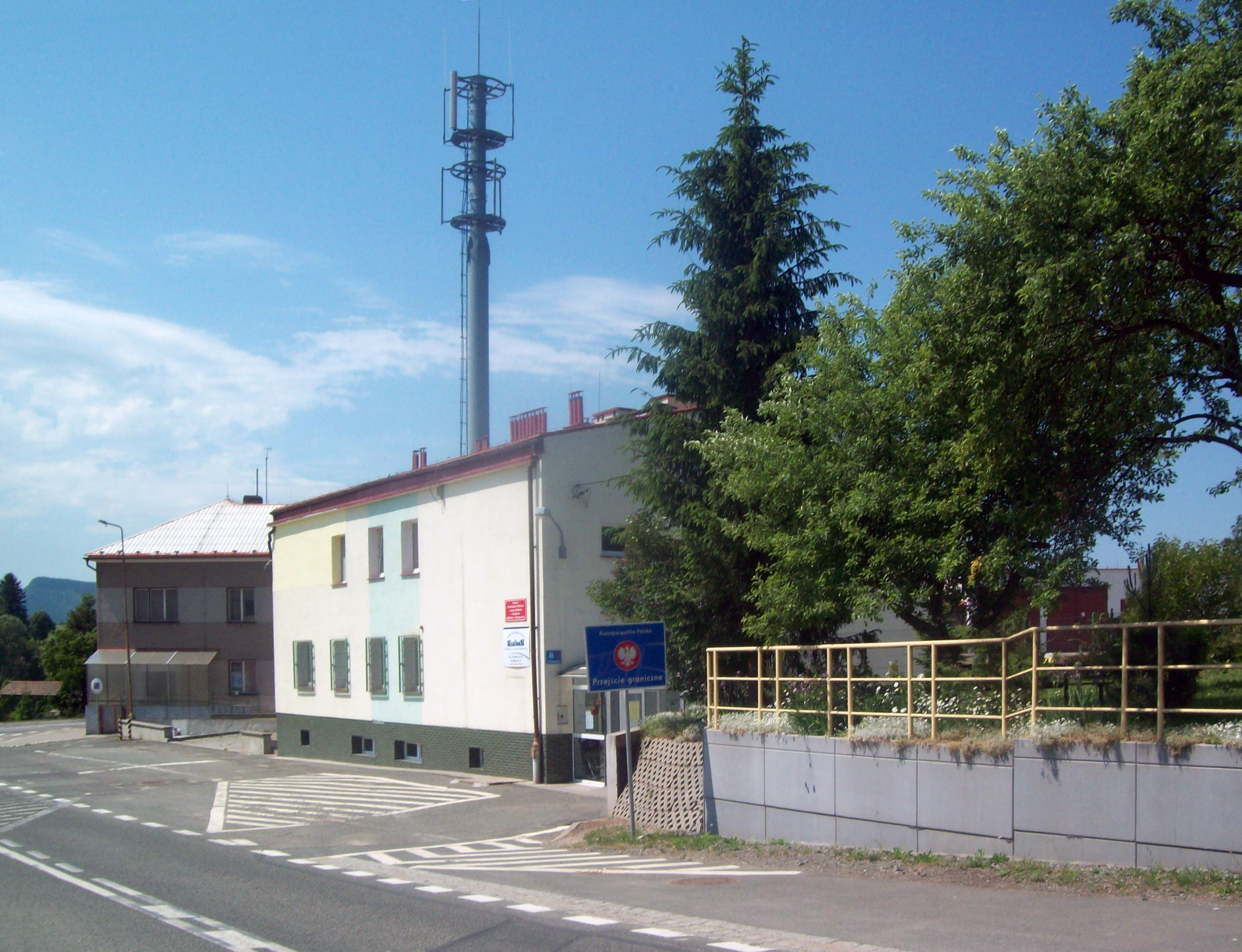 Dawna granica polsko-czeska w Tłumaczowie